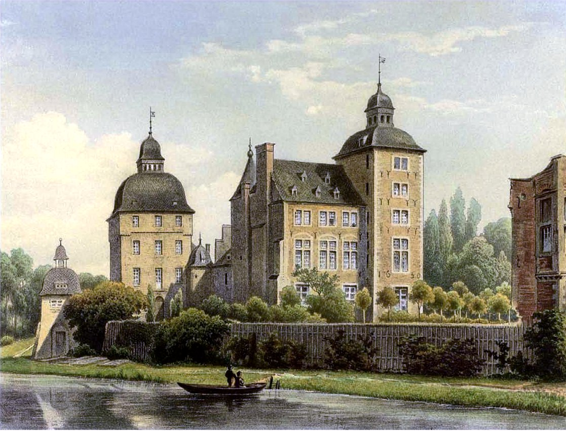 Schloss Myllendonk, Lithografie aus dem 19. Jahrhundert